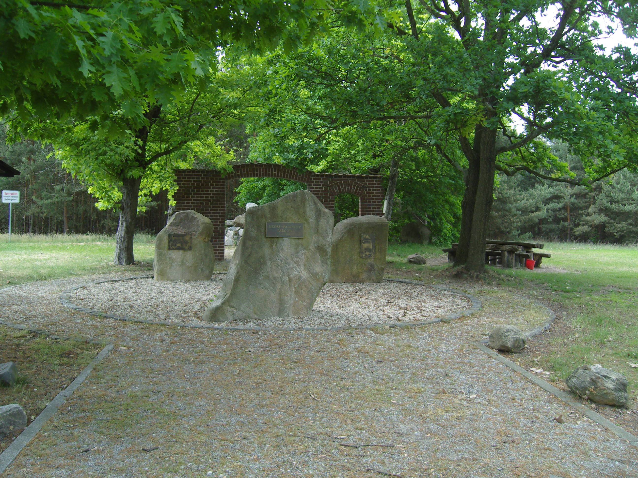 Gedenkstätte in der Nähe Klein Partwitz für den devastierten Ort Groß Partwitz Hornjoserbsce: Wopomnišćo za wotbagrowanu wjes Parcow blisko Bjezdowow